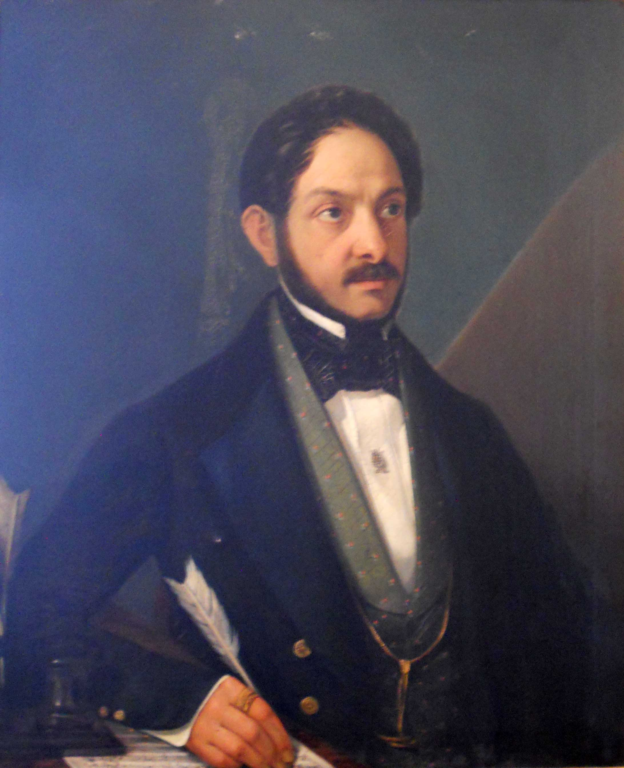 Ritratto del compositore di Montecarotto Giuseppe Magagnini